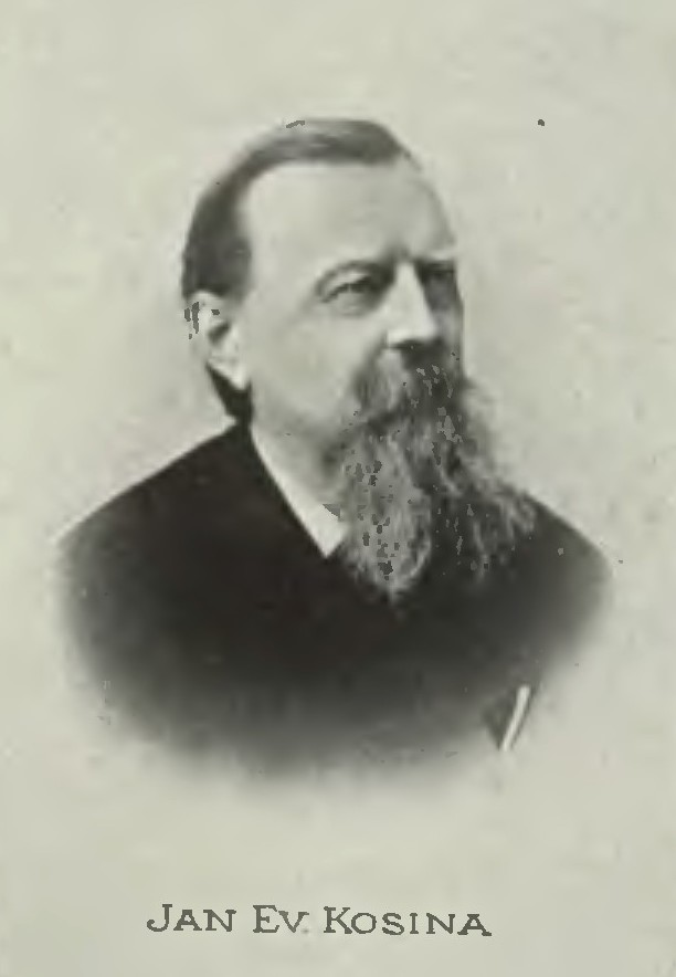 Portrét – Jan Evangelista Kosina (1827-1899), Český pedagog, filolog a spisovatel.